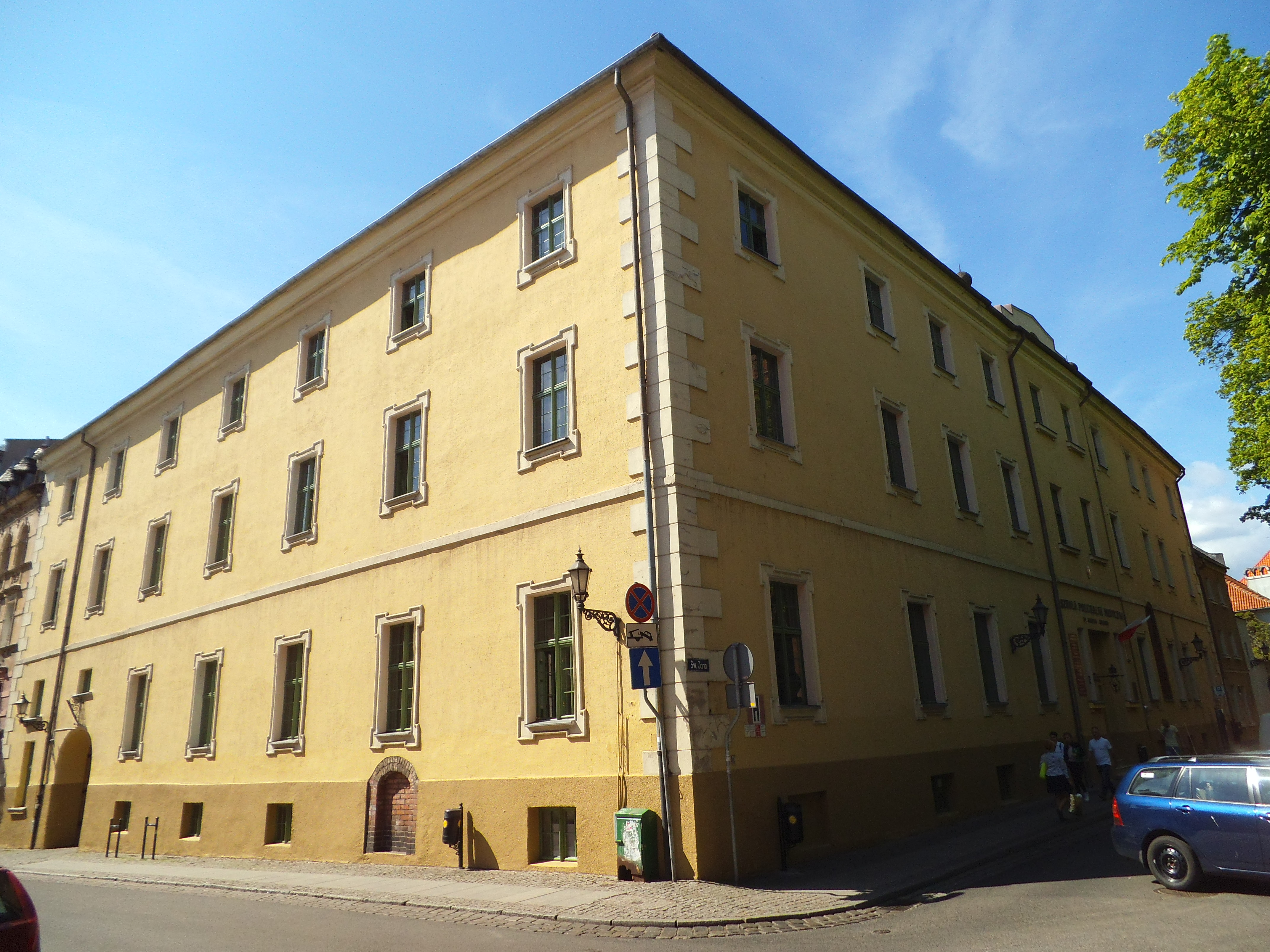 Szkoła medyczna w Toruniu